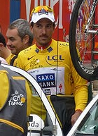 Maillot Jaune Fabian Cancellara lors du Tour de France 2009.